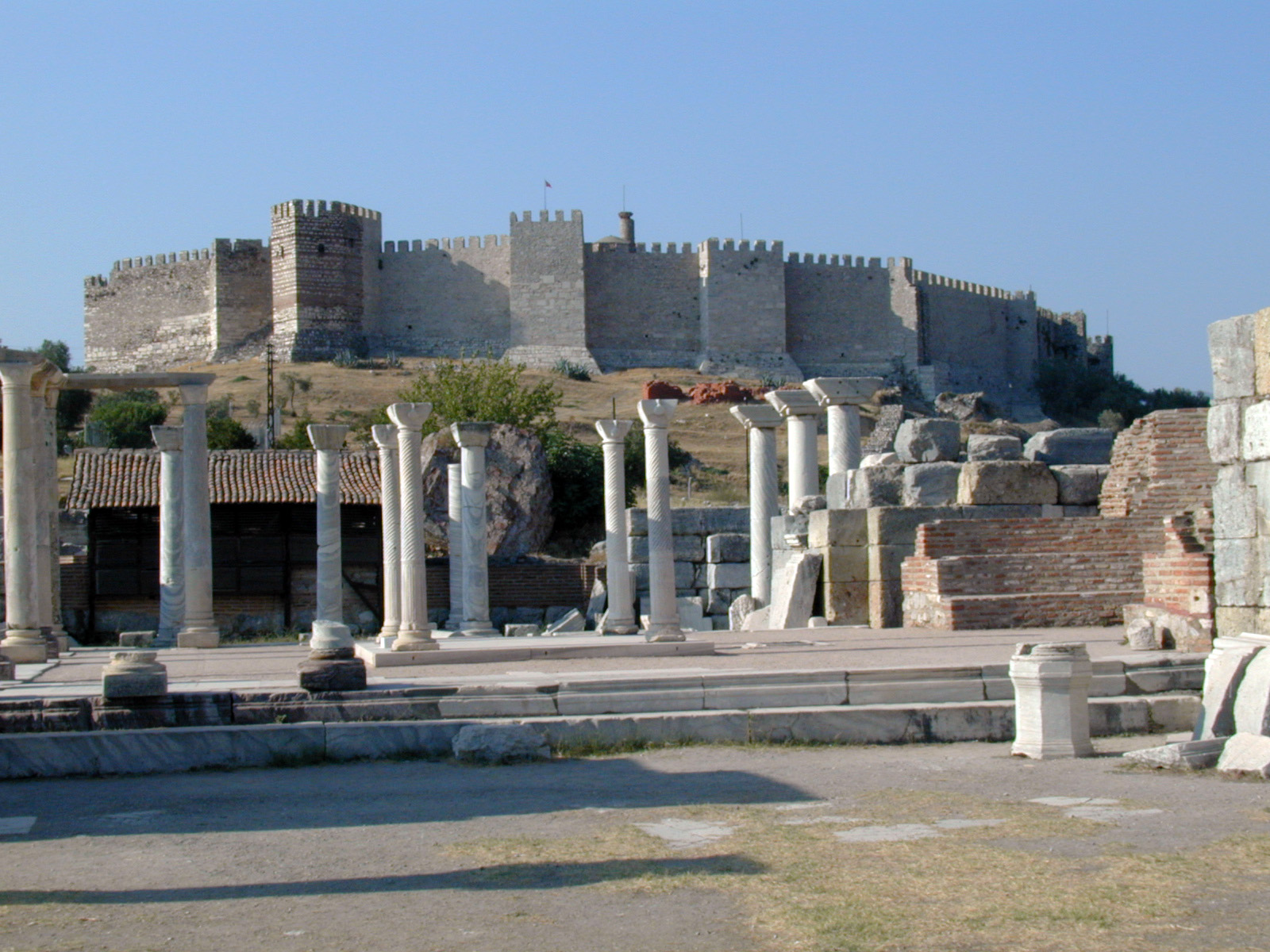 Bema de l'église Saint-Jean (anastylose de la colonnade du templon) et citadelle turque à l'arrière-plan.